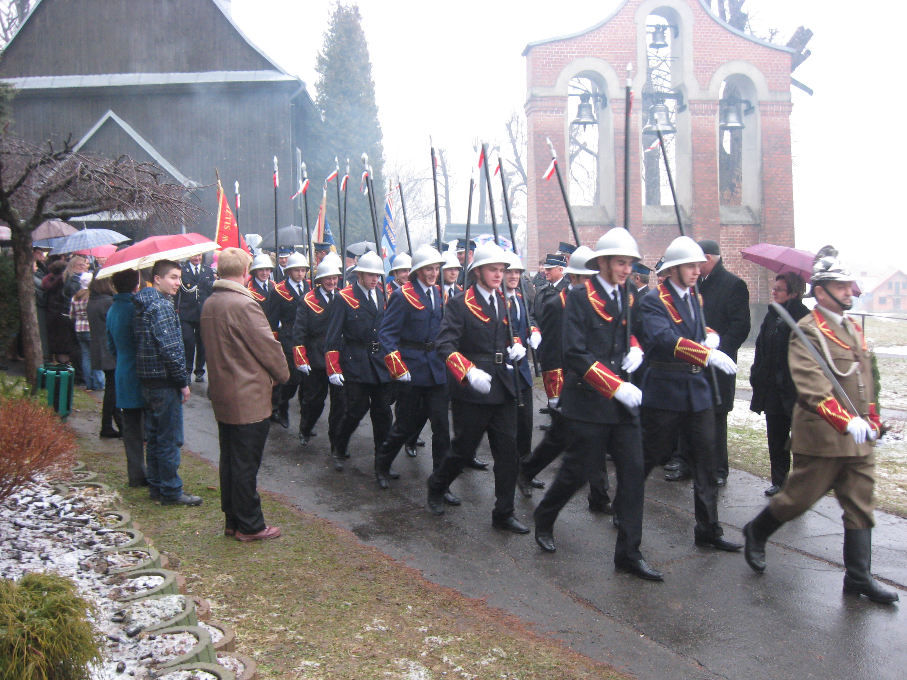 Straż Grobowa po mszy rezurekcyjnej w Sławęcinie.